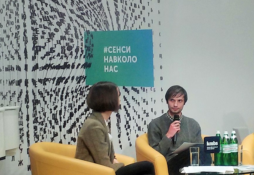 Назарій Заноз і модераторка Тетяна Терен під час читання текстів із шорт-листа Відзнаки молодих есеїстів “ШЕРЕХ-2016”.